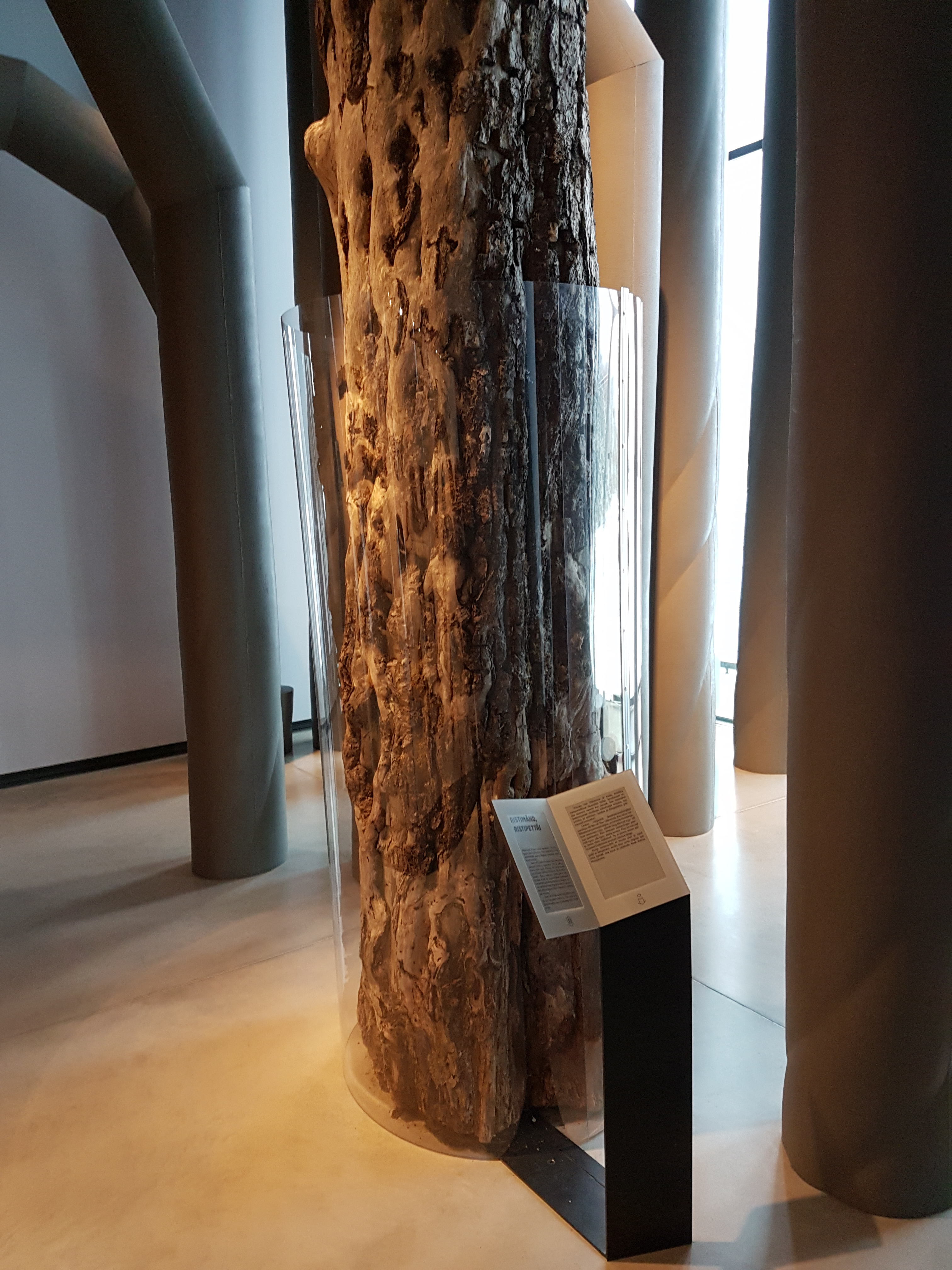 Laatre ristimänni tüvi Eesti Rahva Muuseumis